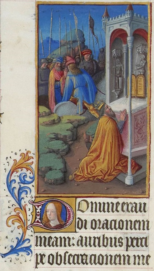 Début du Psaume 143 (142), Les Très Riches Heures du duc de Berry Folio 70v